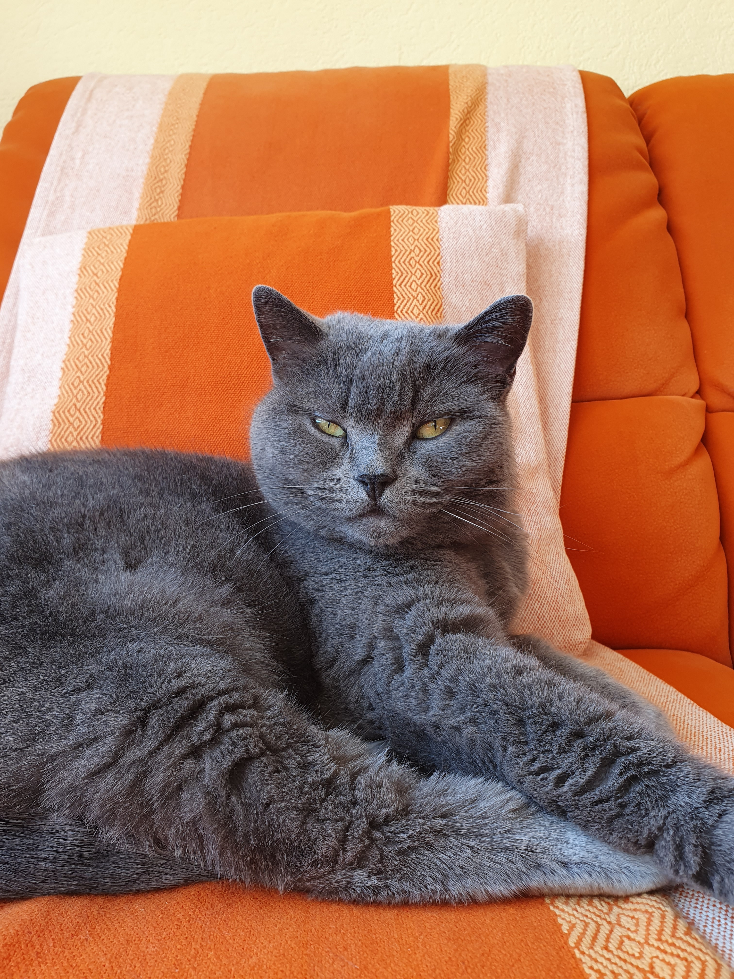 Eine liegende graue Katze mit halb geöffneten Augen, guckend Richtung Betrachter. Bei der Katze handelt es sich um eine feminine Britisch Kurhaarkatze namens Mimi. Diese Katze wurde am 21.08.2009 geboren.